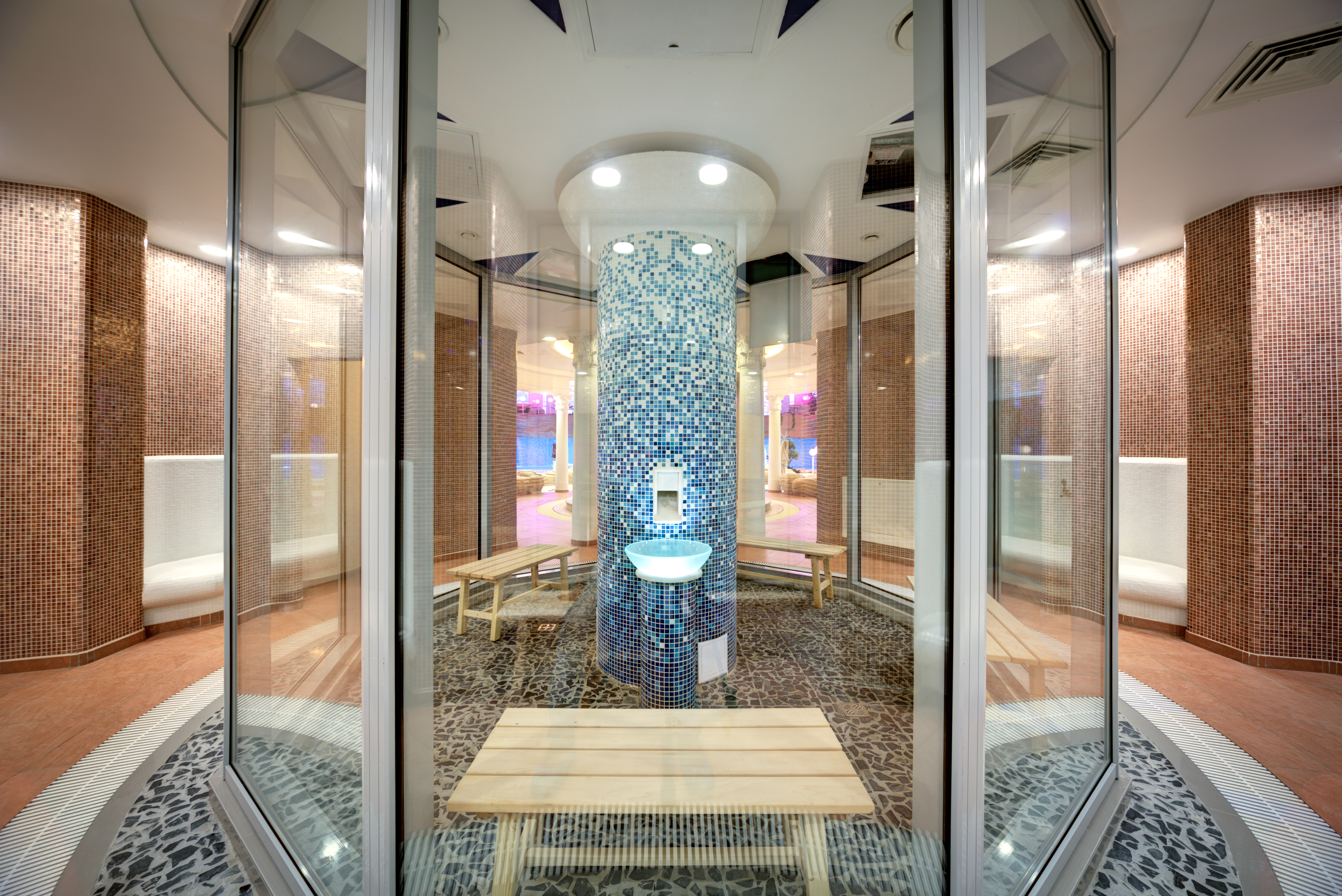 Современный фригидарий (Холодная комната) в римской бане в Мореоне